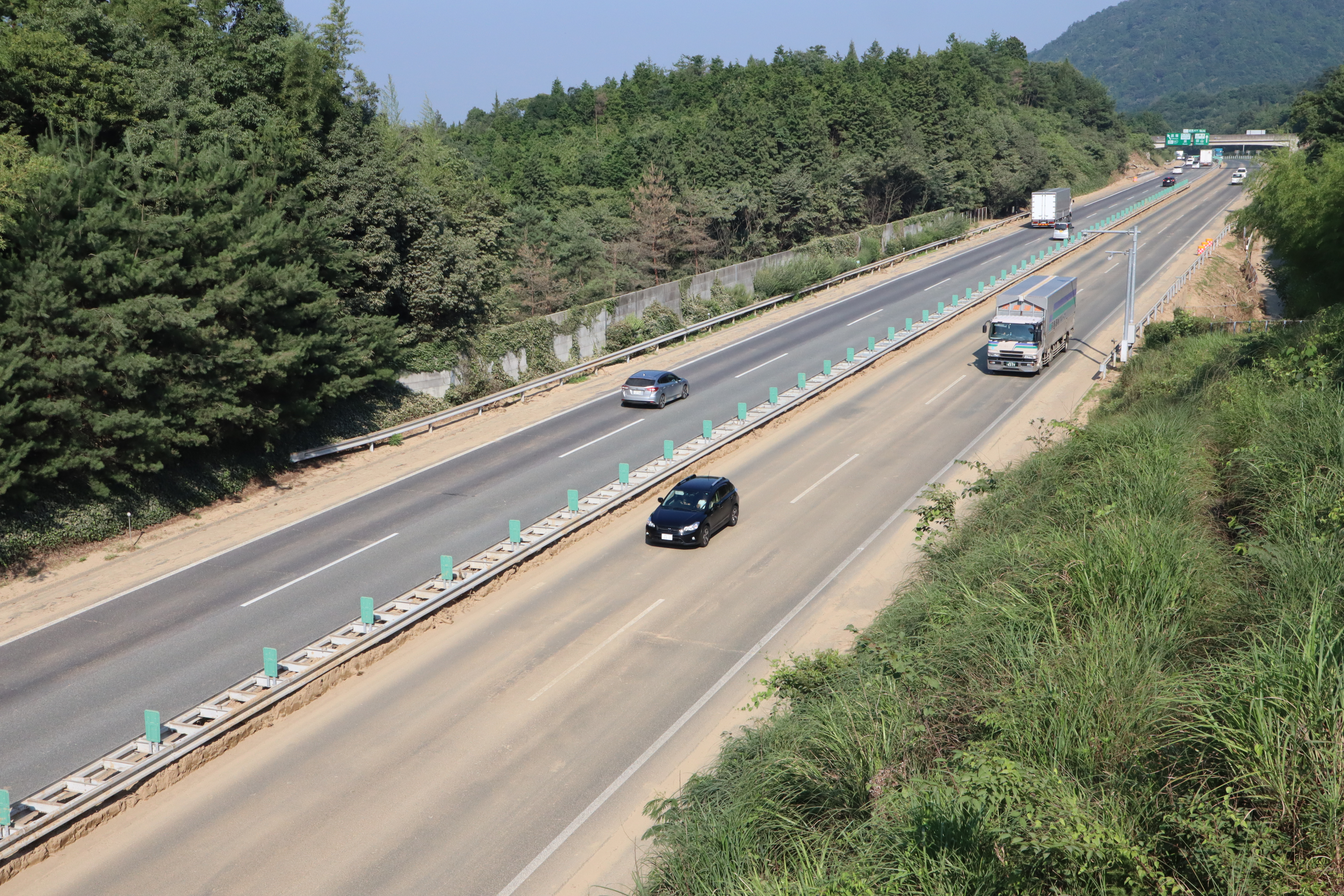 2018年7月16日撮影。復旧した山陽道の西条-高屋間を撮影。画像手前が西条、奥が高屋。路肩や中央分離帯に土砂が残っている。